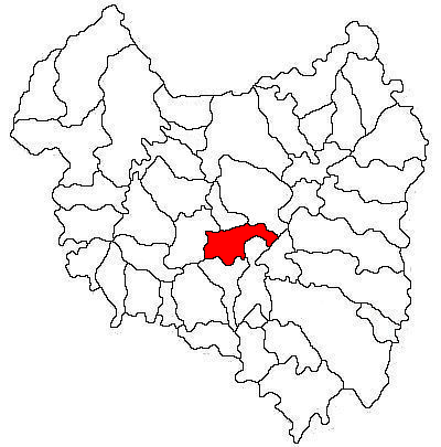 Categorie:Hărţi ale judeţului Covasna